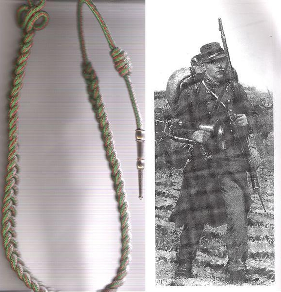 fourragère puis soldat du 48e R.I